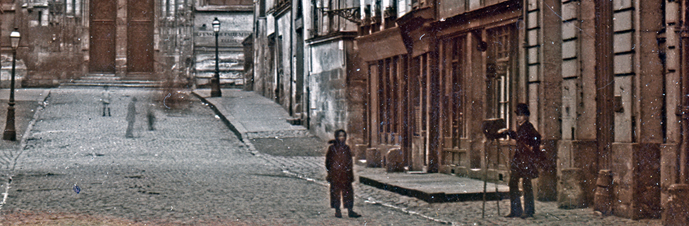 Photographe du XIXème siècle en action